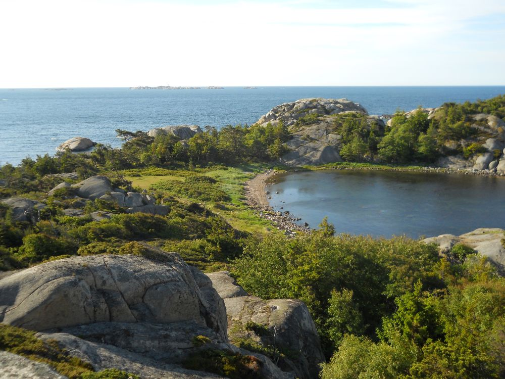 Utsyn over Flaskebukta.